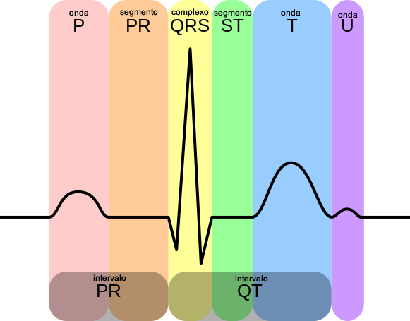 Representação esquemática do eletrocardiograma (ECG)